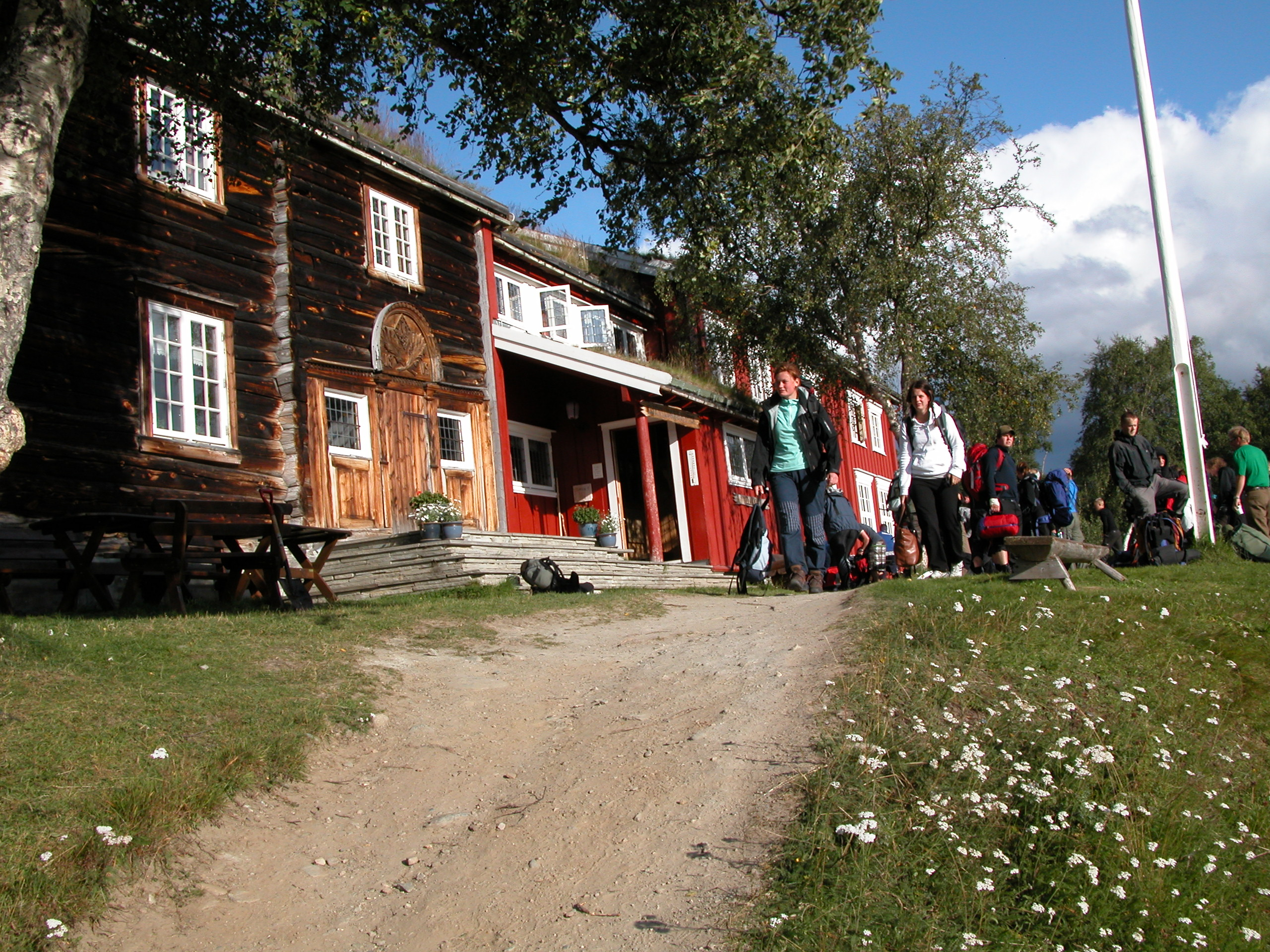 Gjevilvasshytta i Trollheimen i Sør-Trøndelag.